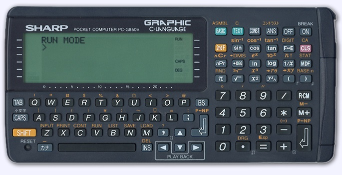 PC-G850V